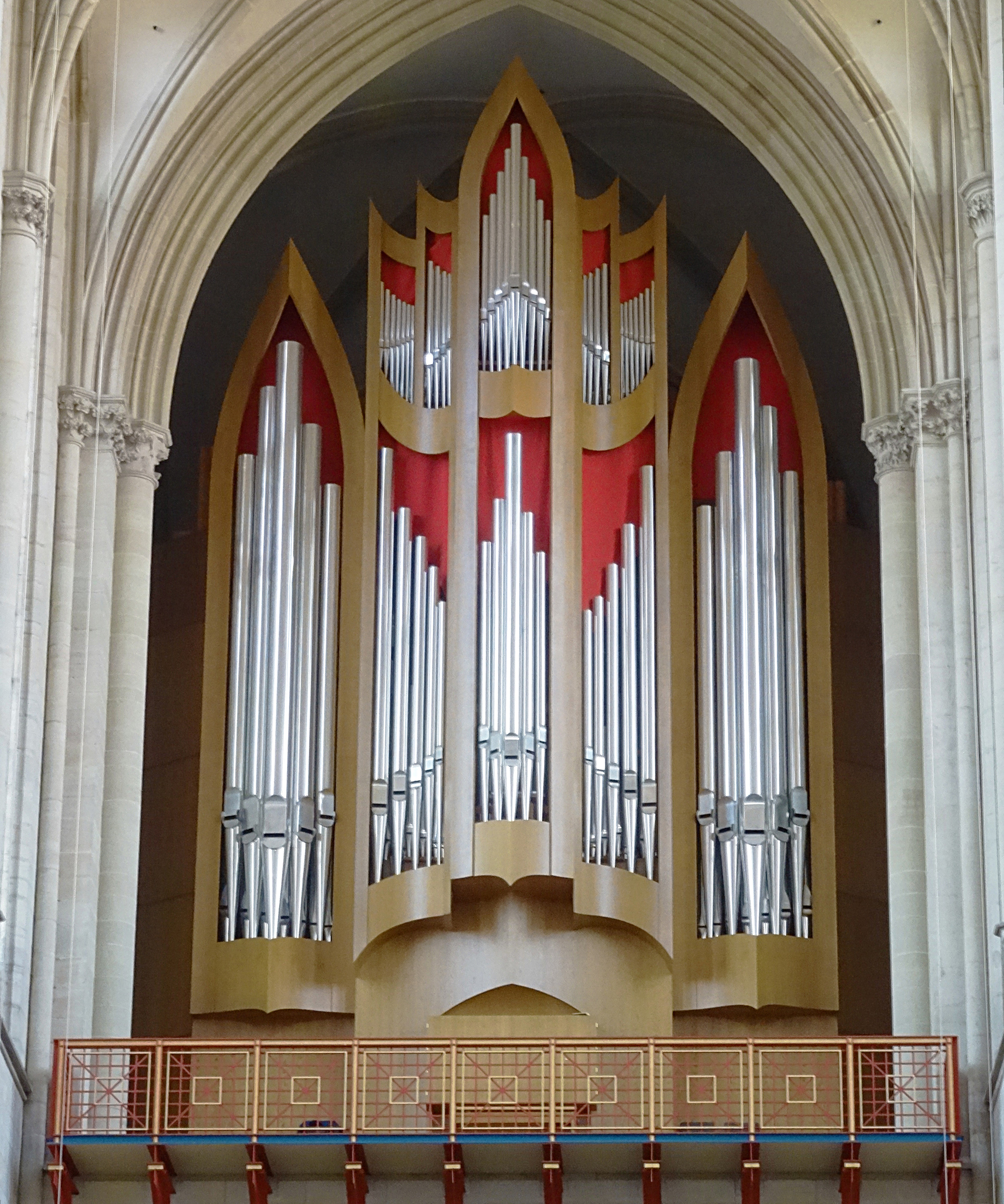 Hauptorgel von Alexander Schuke Potsdam Orgelbau (2008, Opus 619, IV/P 93) auf der Westempore im Magdeburger Dom